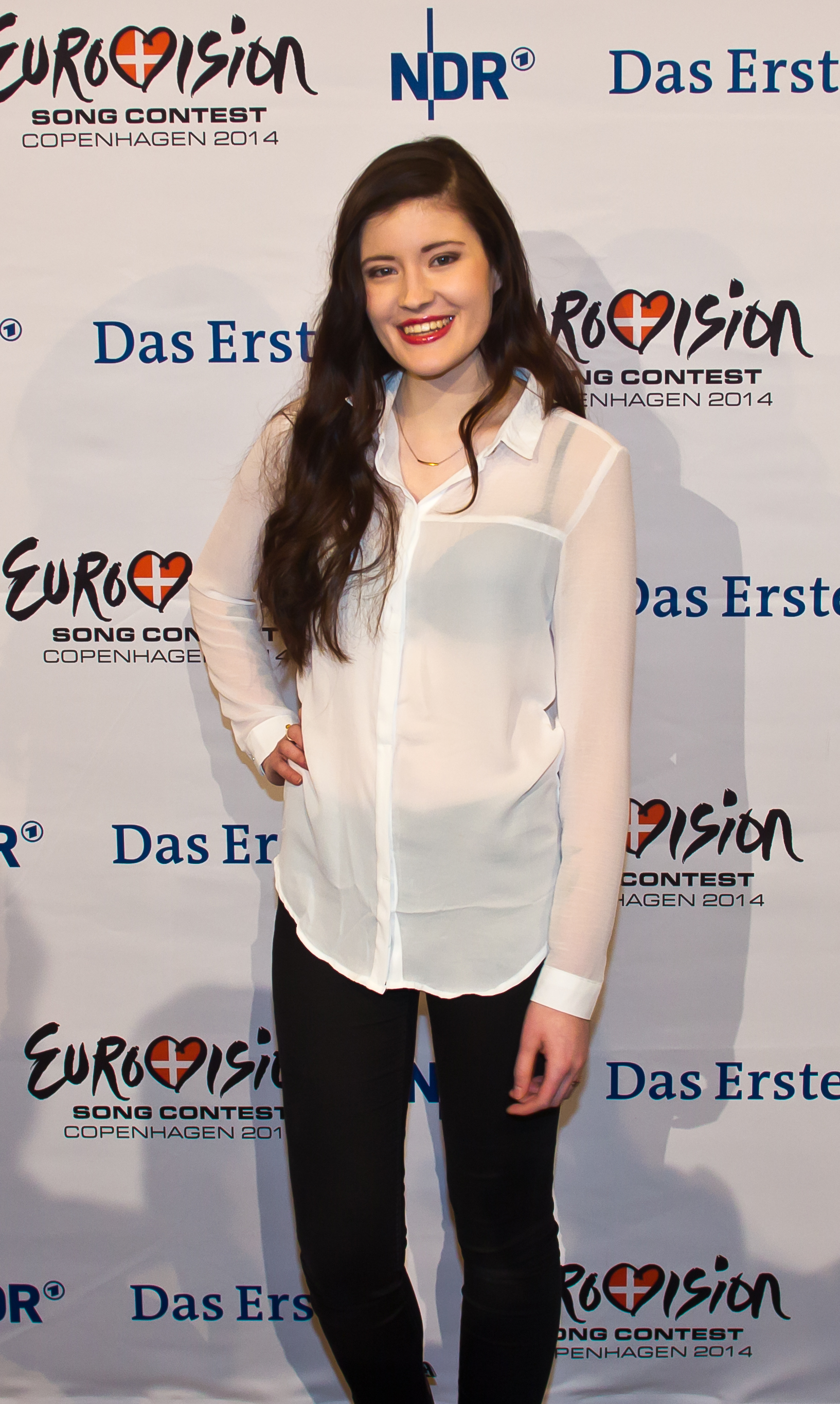 Pressekonferenz am 2. Probentrag von "Unser Song für Dänemark" mit allen 8 ActsFoto: Moderatorin Barbara Schöneberger und Madeline Juno